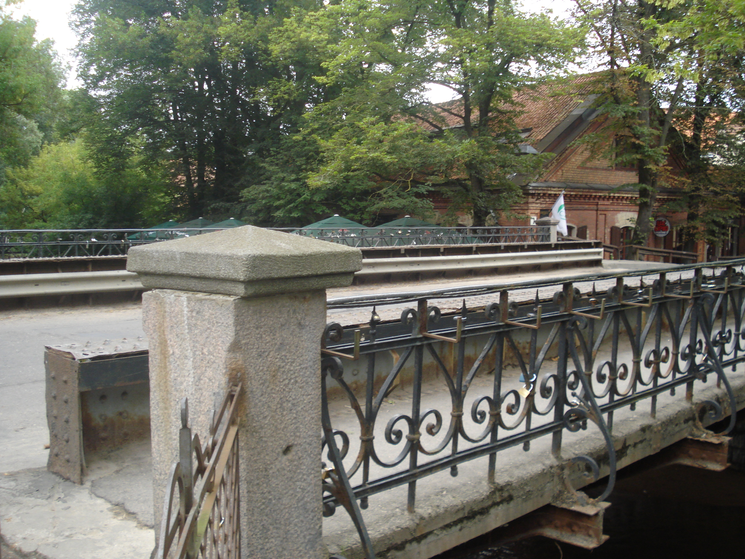 Užupio bridge over Vilnia river (Užupio tiltas, jungia Maironio ir Užupio g.) in Vilnius. 1881-1901